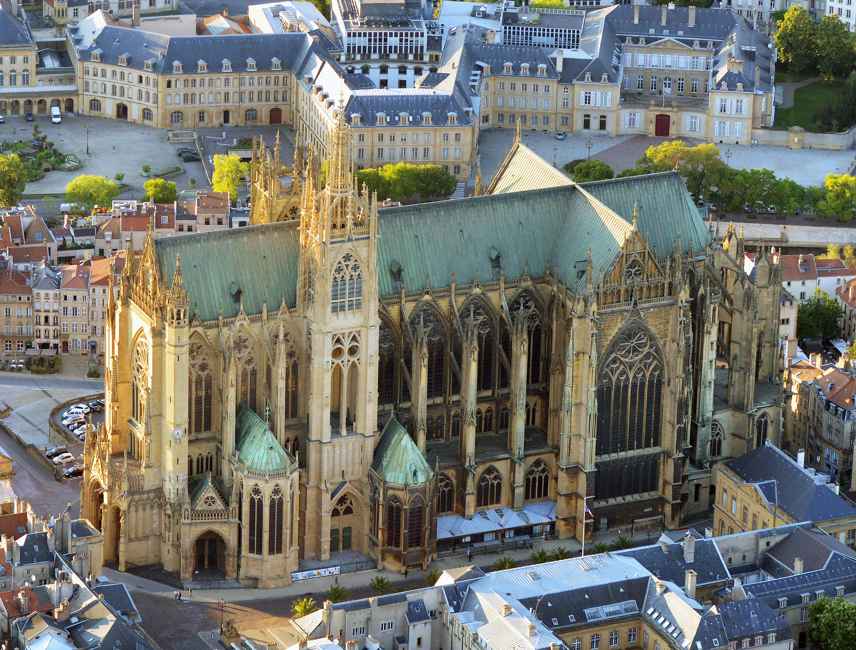 Stadtzentrum Metz